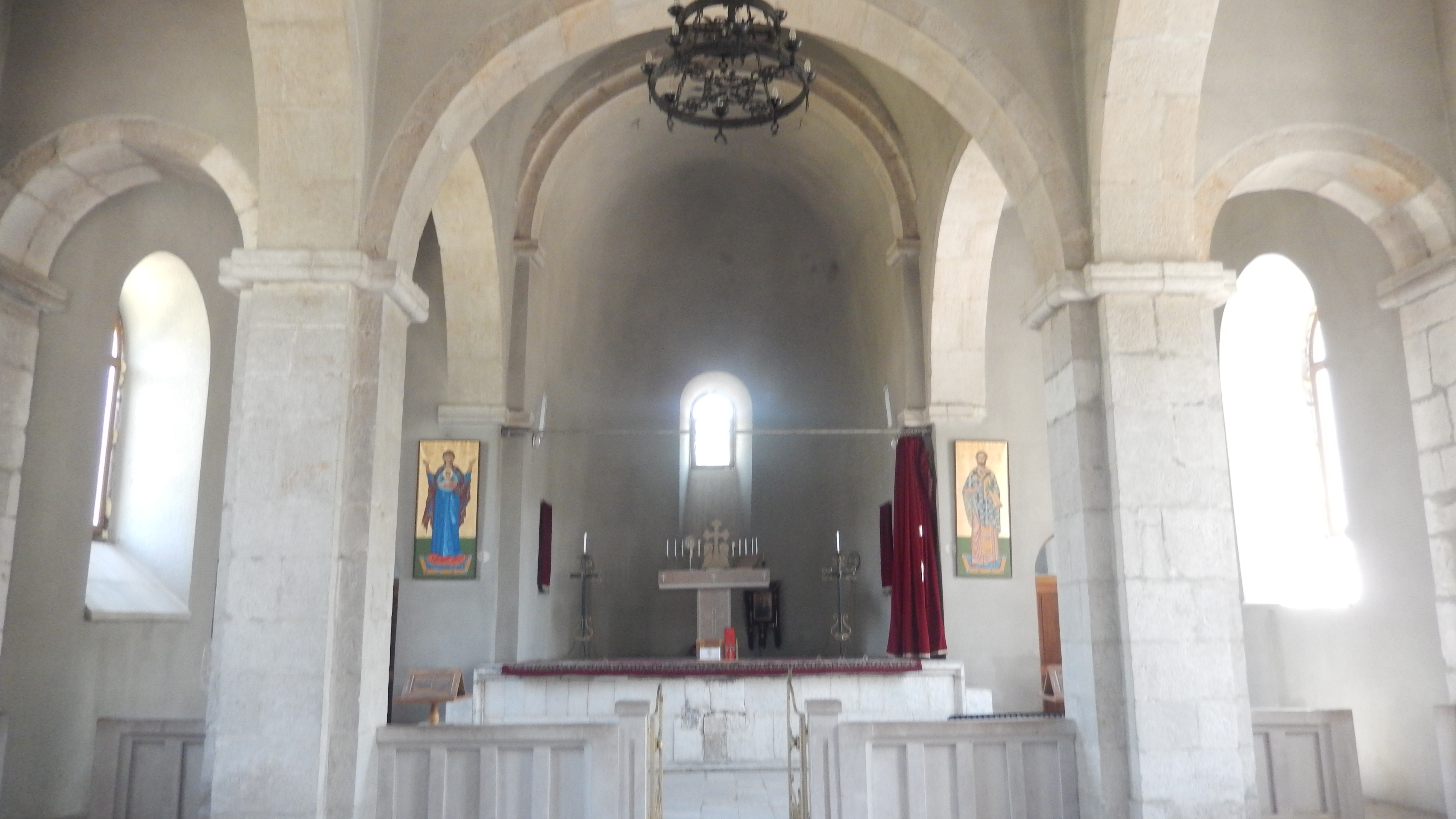 Վանական համալիր «Ամարաս»